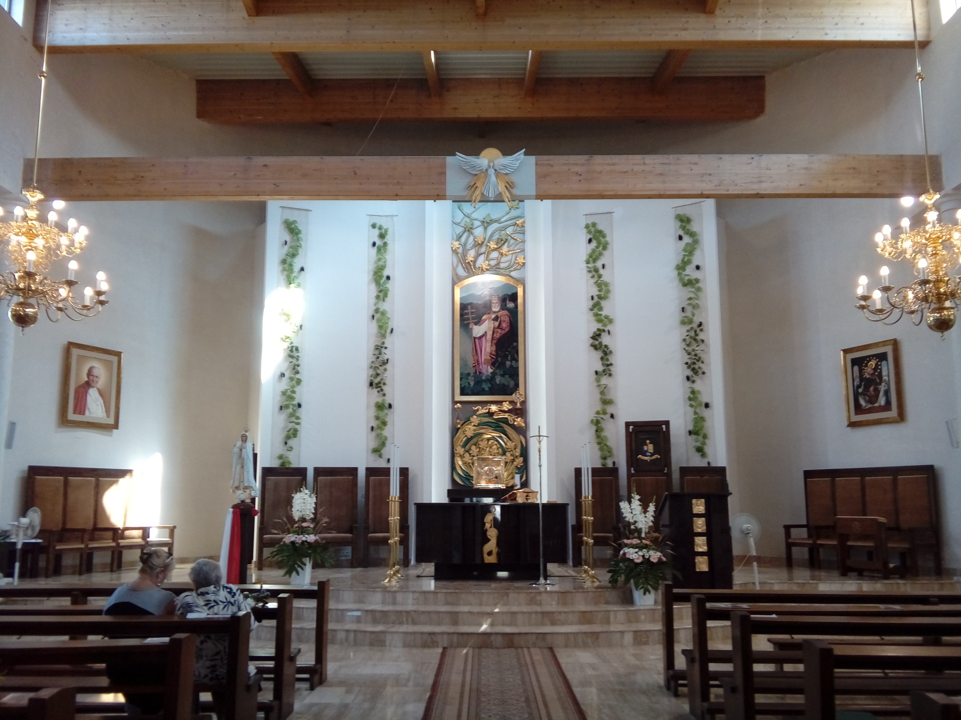 Widok na ołtarz główny kościoła św. Urbana I w Zielonej Górze